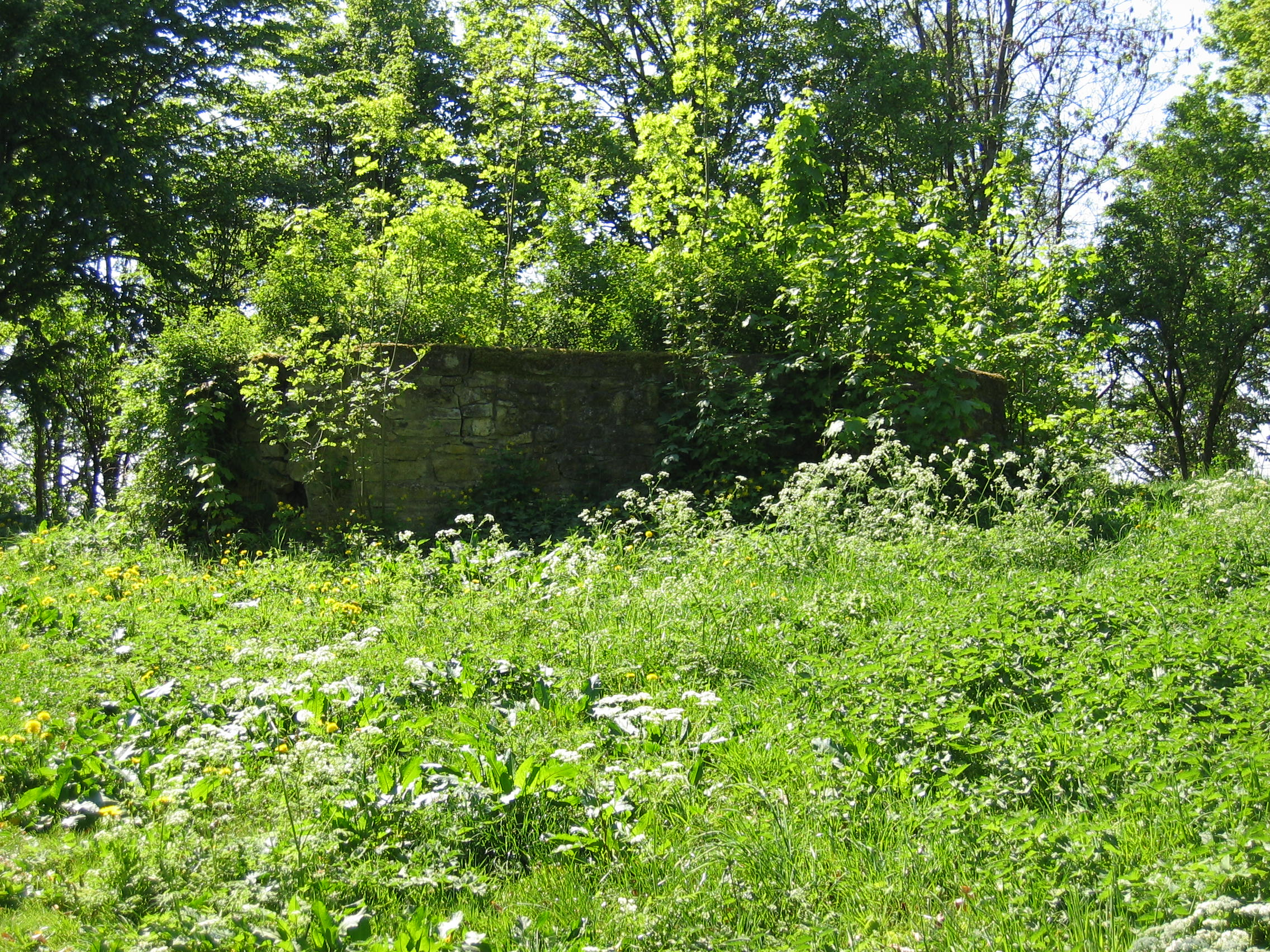 Nellenburg, Reste des Haupturms